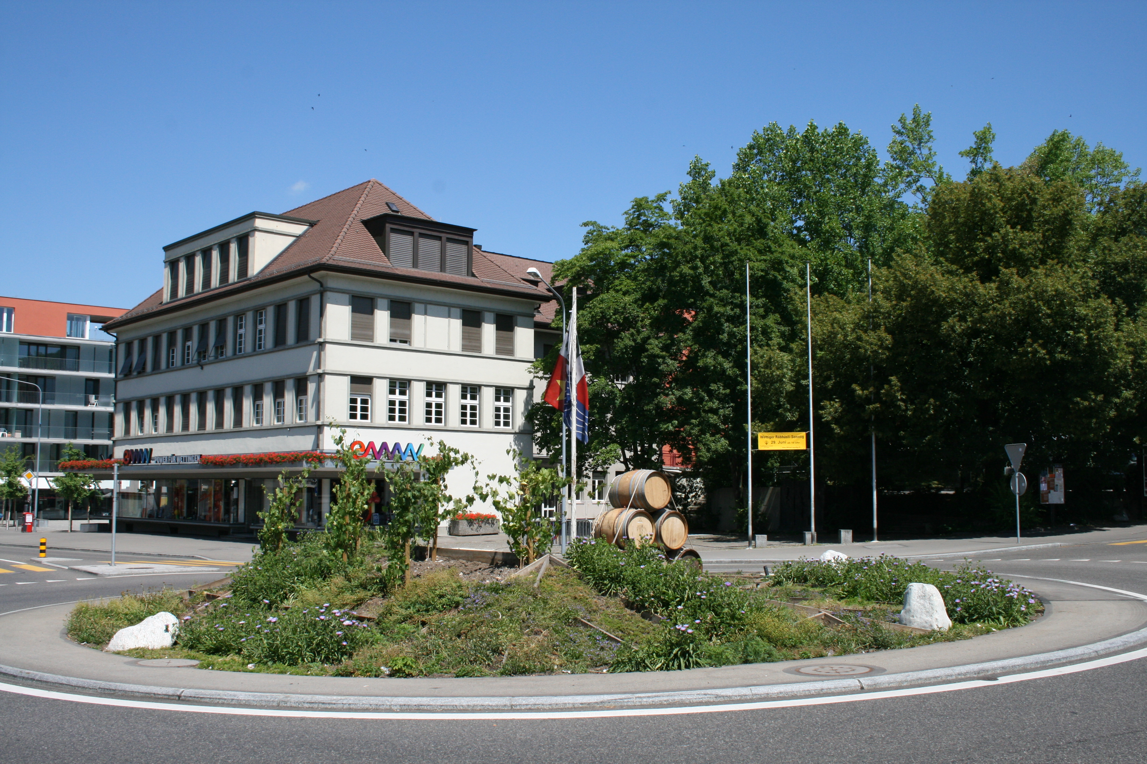 Verkehrskreisel Landstrasse-Zwyssigstrasse in Wettingen AG, Schweiz